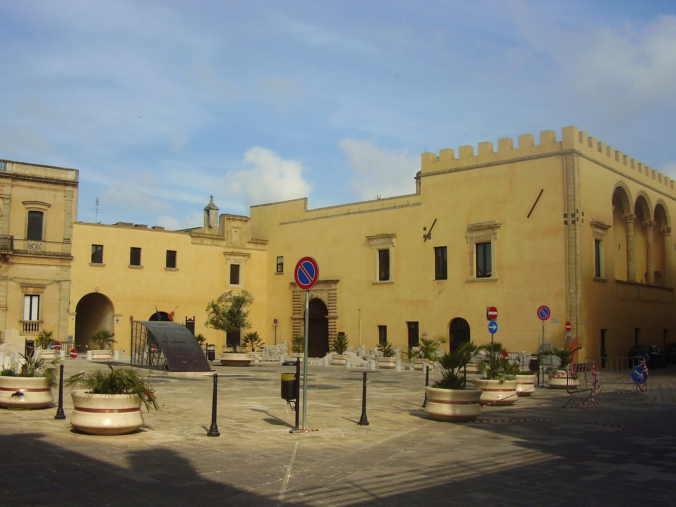 Piazza di Presicce, Lecce